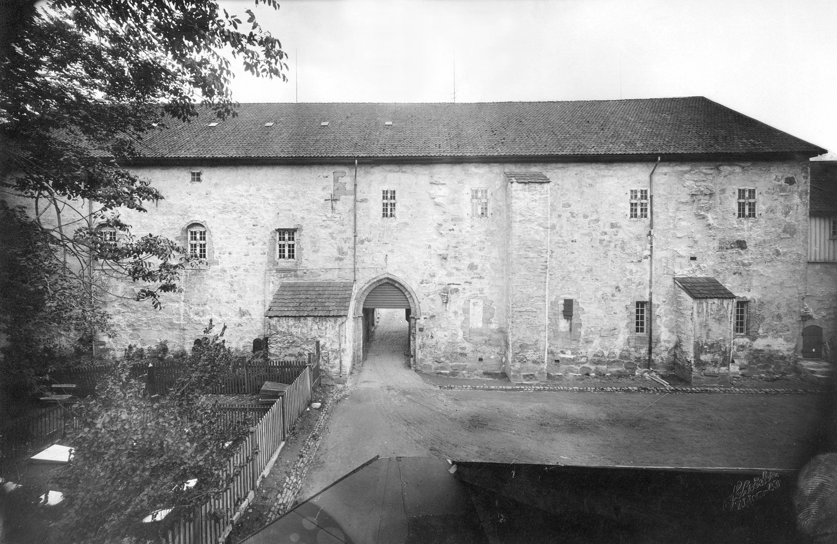 Erkebispegården i Trondheim, Sør-Trøndelag Nordfasaden sett fra nord.